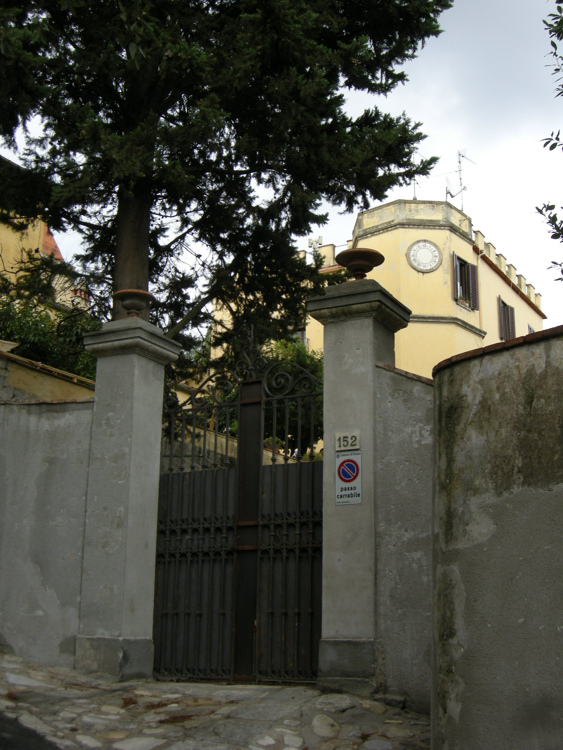 Villa di quarto, ingresso